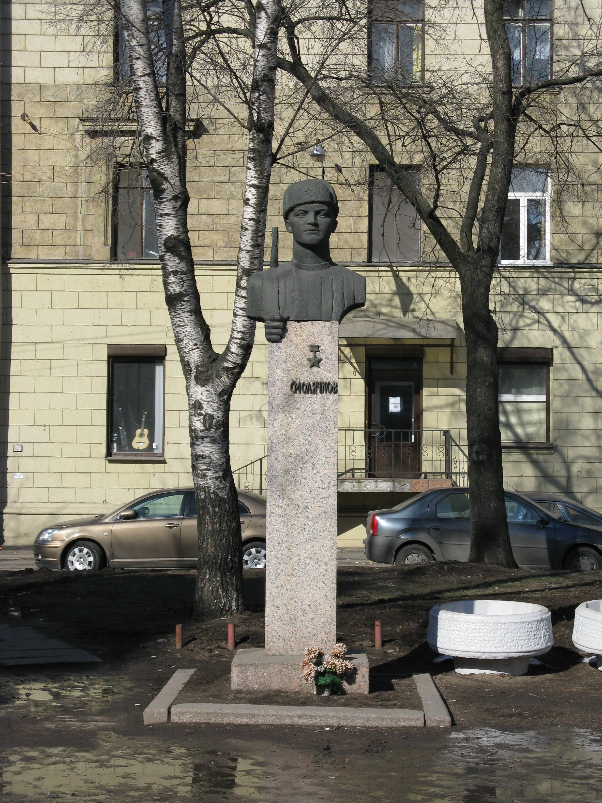 Monument to Smoliachkov on Smoliachkova Street